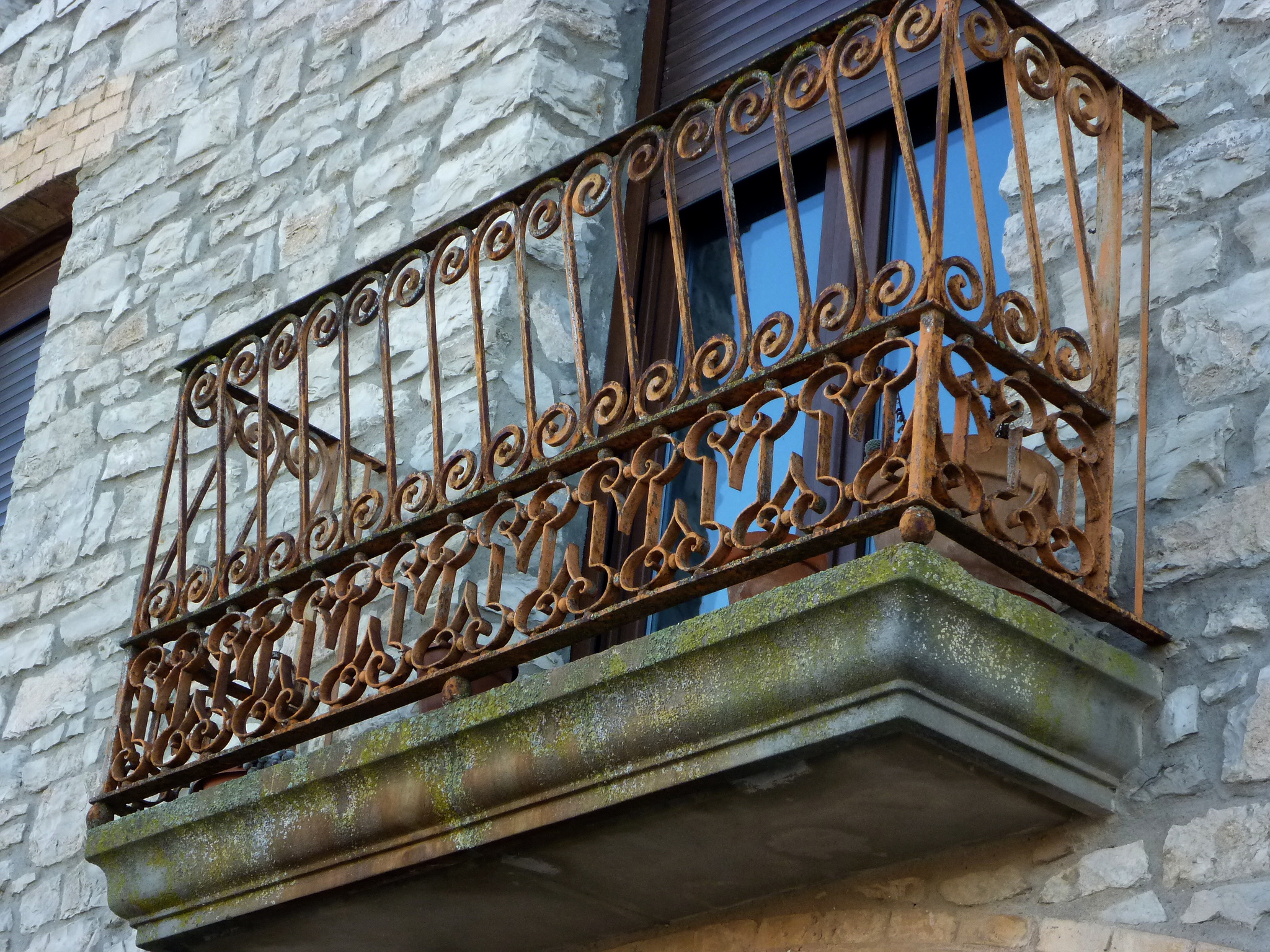 Cal Mingo (Tarroja de Segarra): detall d'ubn balcó